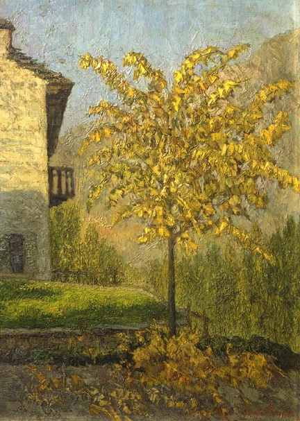 "Il mio tiglio a Malesco", 49 x 36 cm., proprietà Intesa Sanpaolo